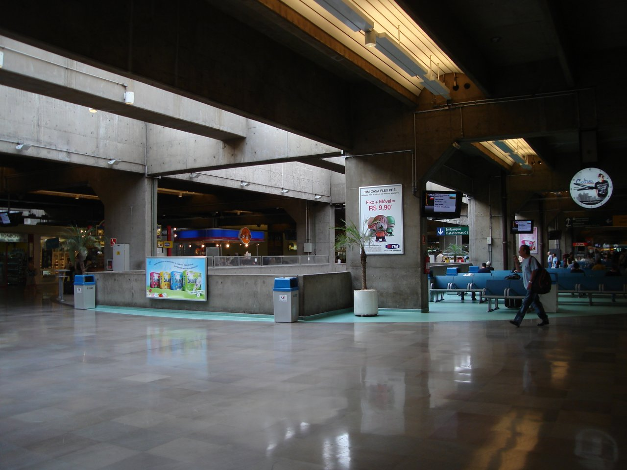 dentro do Terminal Rodoviário Tietê, São Paulo